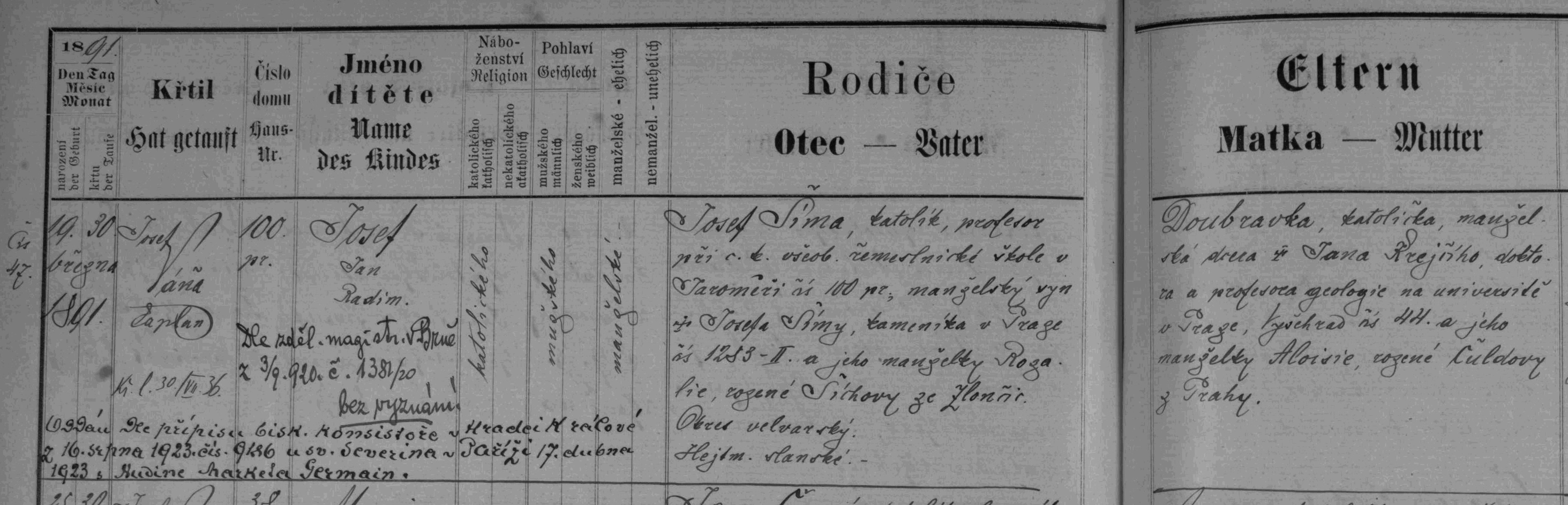 matriční zápis o narození a křtu Josefa Šímy (matrika N1884-1893 města Jaroměře, SOA Zámrsk)